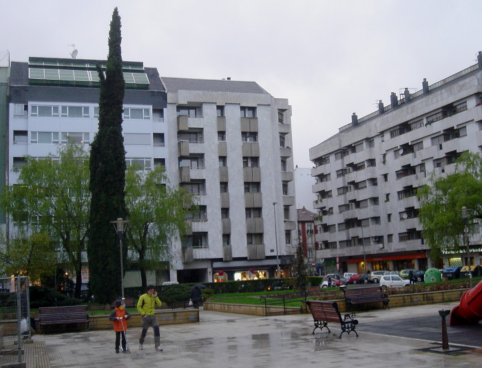 Babesgabetuak auzoa (Gasteiz), Santa Barbarako plaza